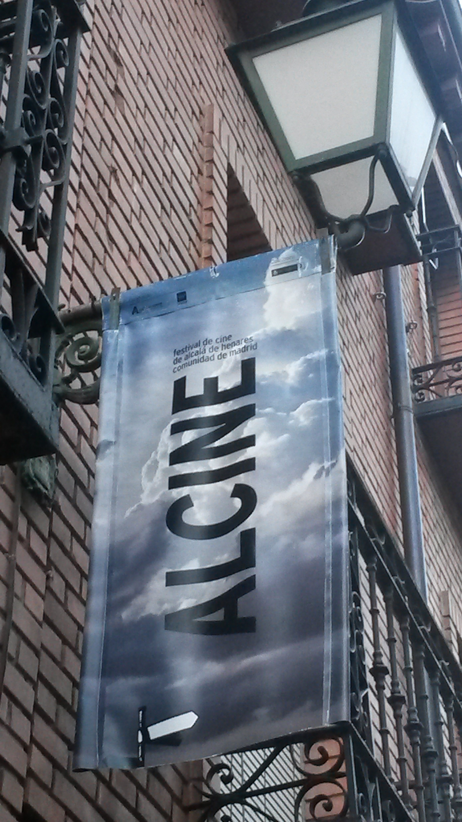 Cartel anunciador del Festival de Cine de Alcalá de Henares (ALCINE) en la calle Mayor complutense.